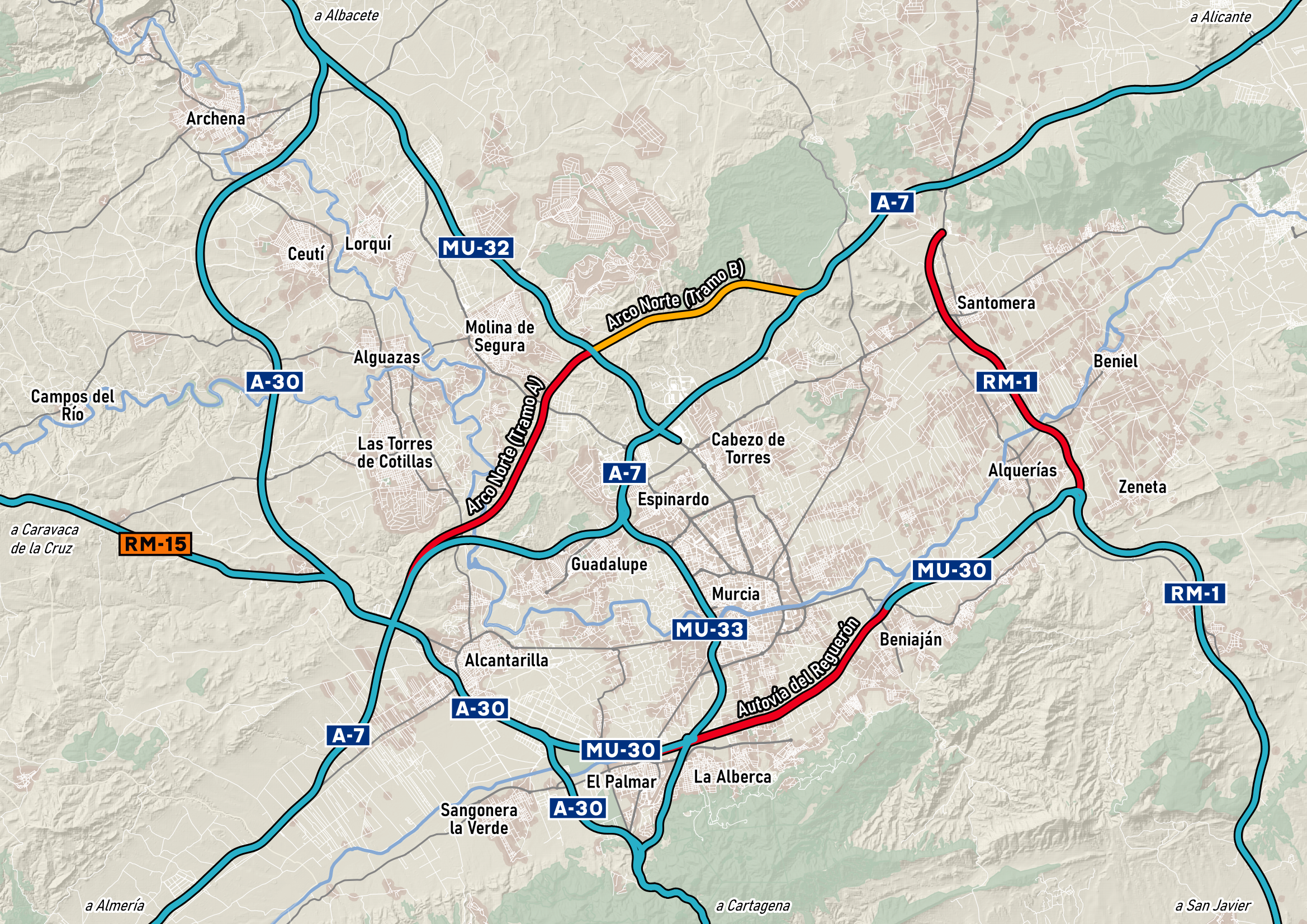 Mapa de las autovías en el entorno de Murcia, con los futuros Arcos Norte y Noroeste, Autovía del Reguerón y RM-1. Autovías en servicio Autovías en proyecto Autovías en construcción